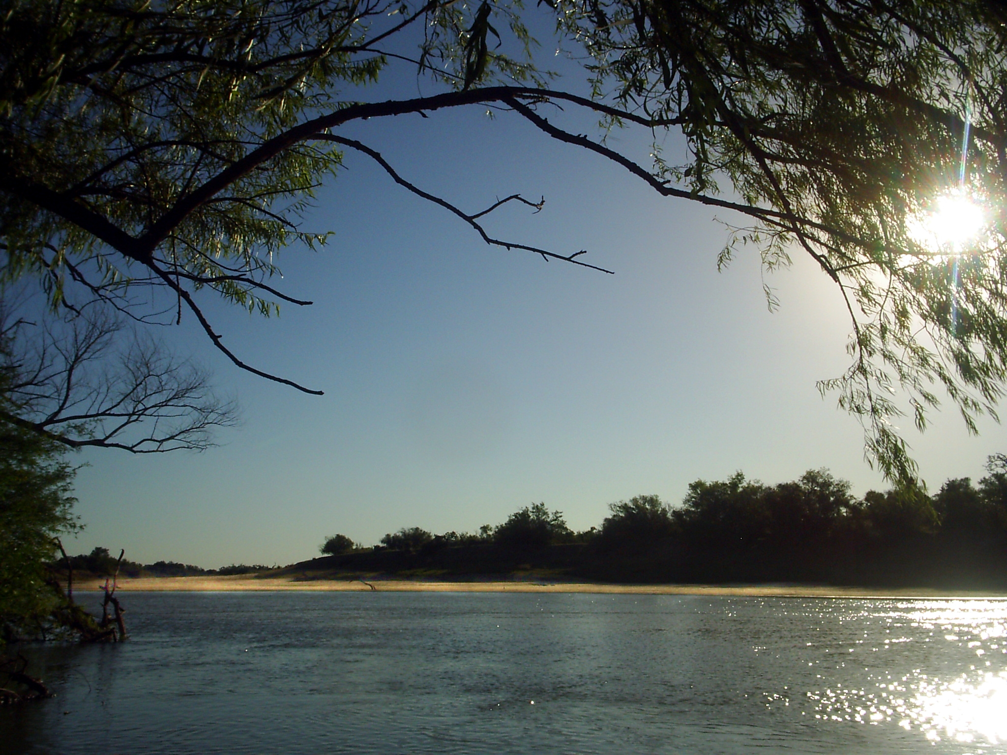 Foto del rio Gualeguay cerca de balneario Paso de la Lana, Aldea Asuncion.